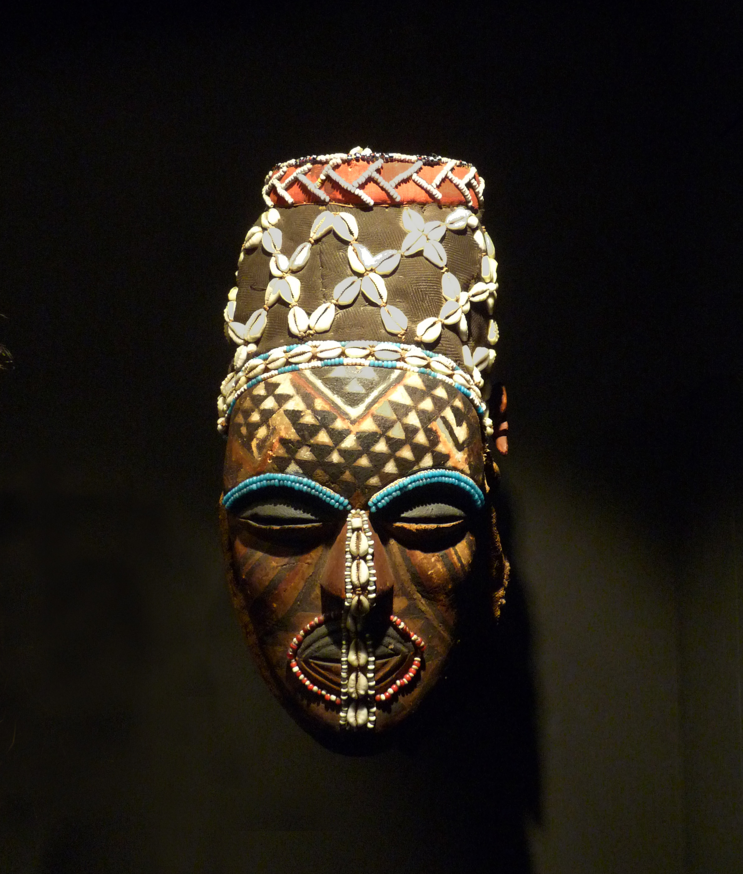 Masque de visage féminin (ngady mwaash). 19e siècle. Bois, peinture rouge et blanche, raphia tissé, tissu, cauris, perles de verre. 34 cm. République démocratique du Congo, Kuba. (Musée ethnologique de Berlin)